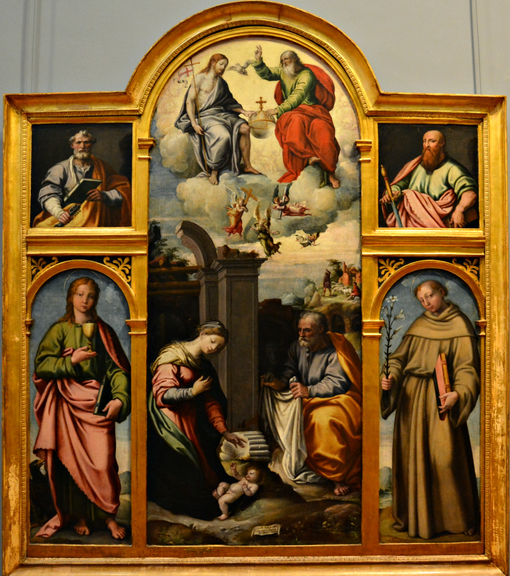 Vedi titolo